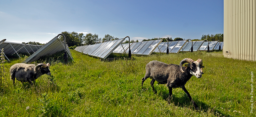 Erik Paasch